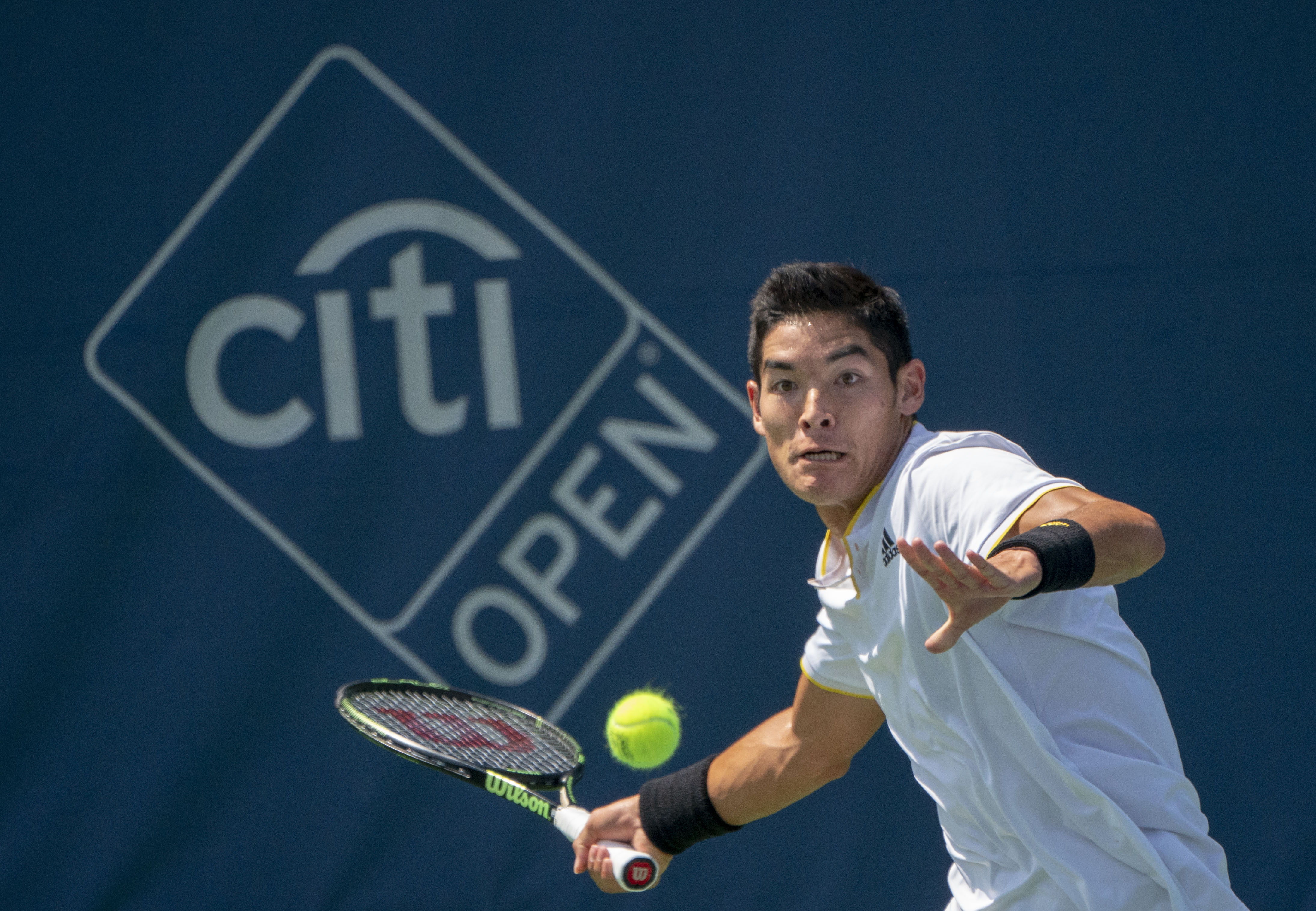 2018 Citi Open Tennis